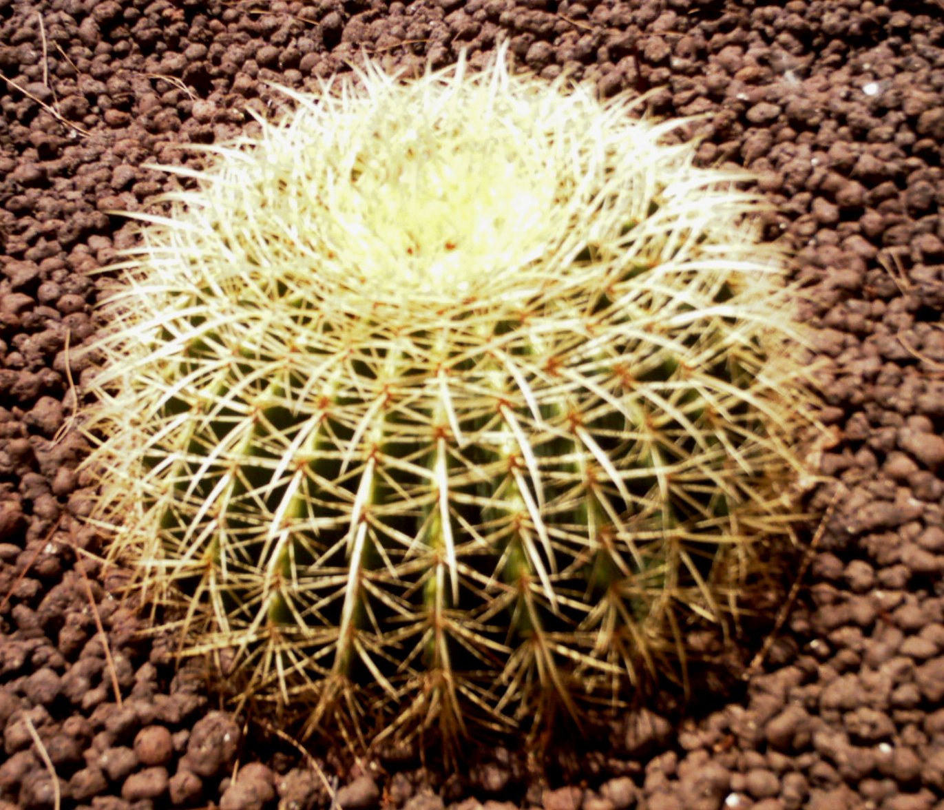 autore Mezzina opera propria